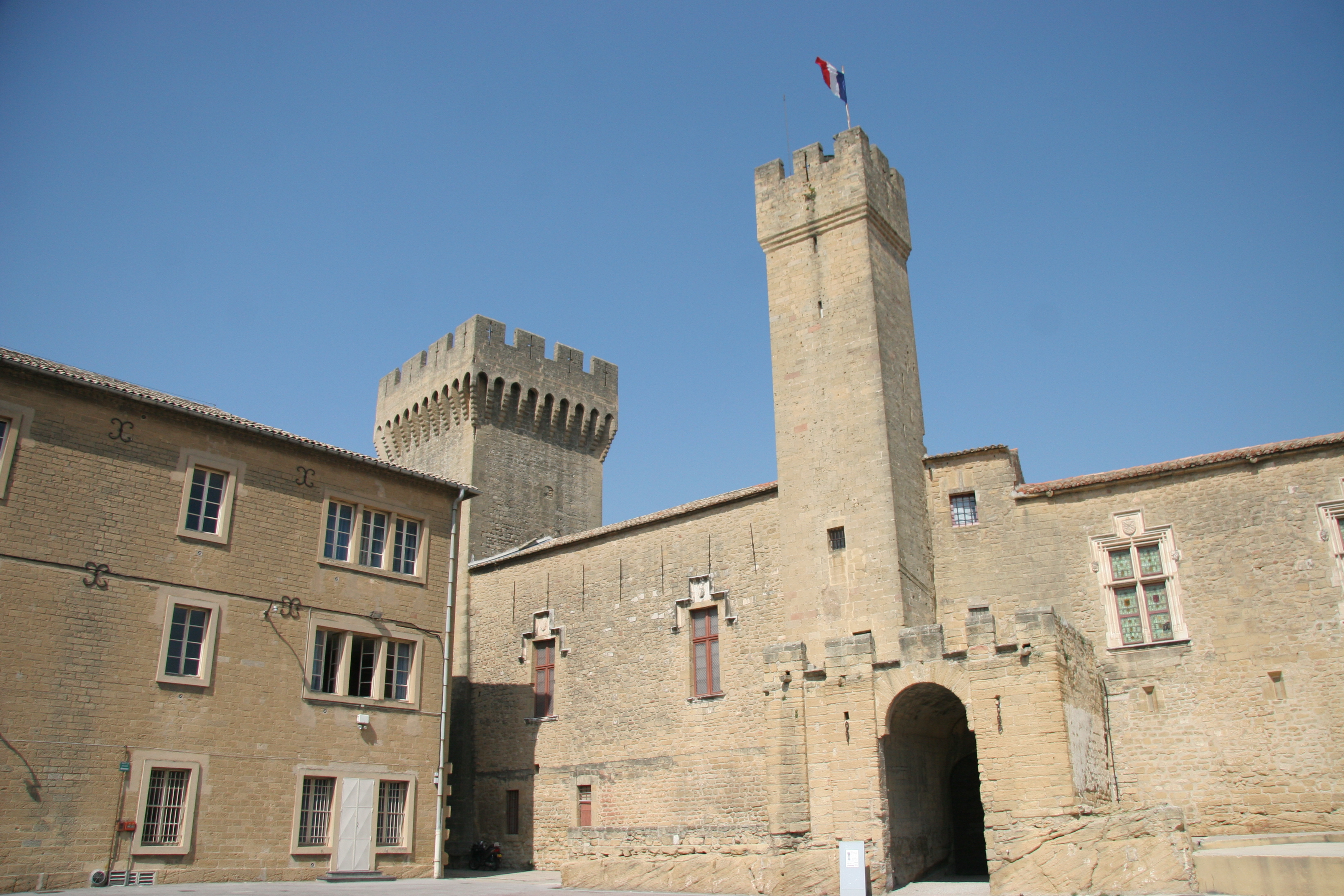 Cour intérieure du Château de l'Empéri à Salon-de-Provence (Bouches-du-Rhône, France)